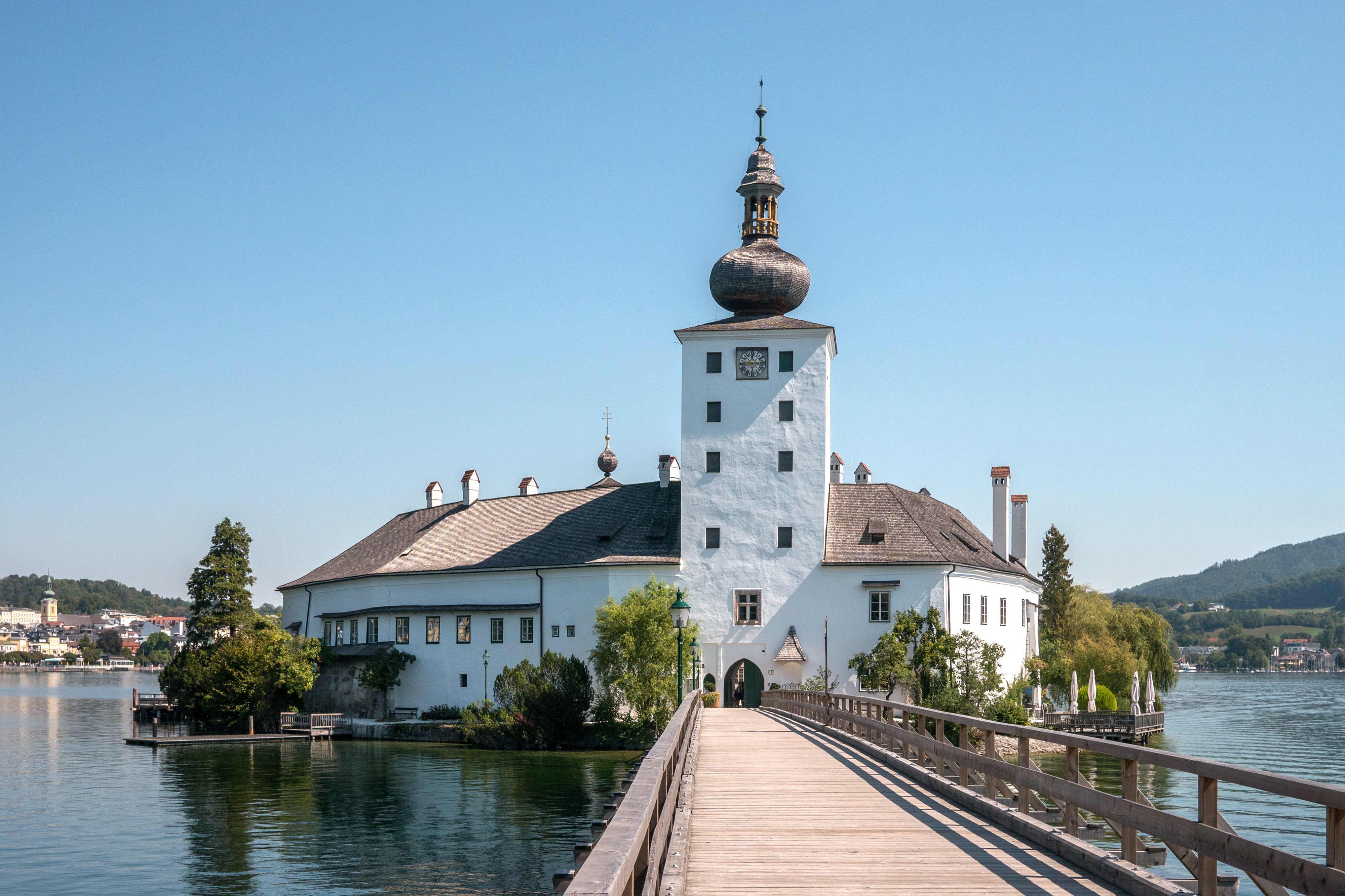 Seeschloß Orth samt Zugangsbrücke